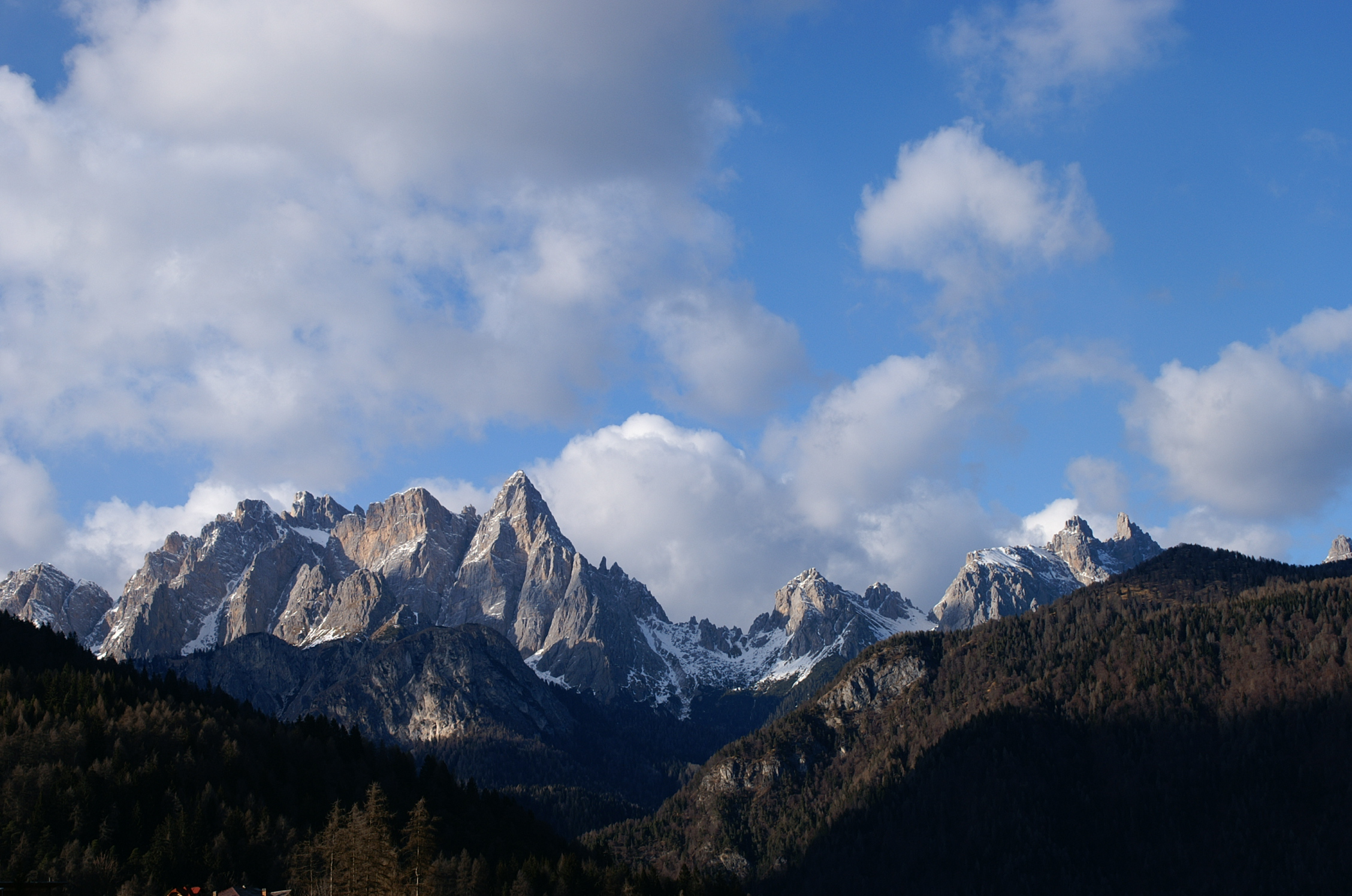 Gruppo delle Marmarole